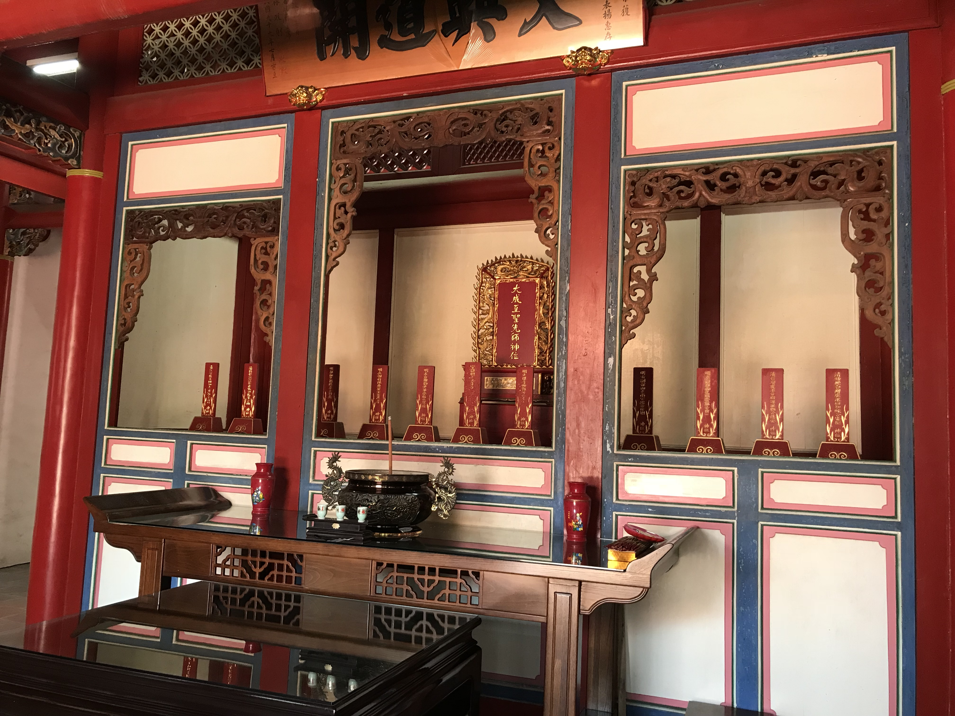 中文（台灣）: 文開書院的孔子、朱子、沈光文、徐孚遠、盧若騰、王忠孝、沈佺期、辜朝薦、郭貞一、藍鼎元神位。